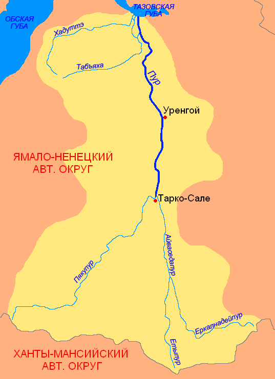 Схема бассейна реки Пур